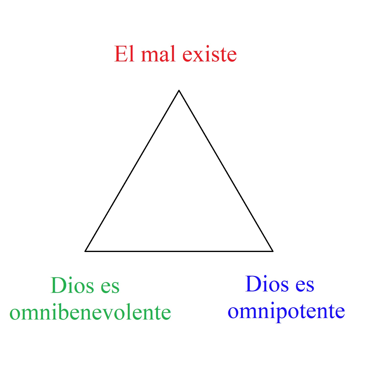 Triada inconsistente del Problema del Mal